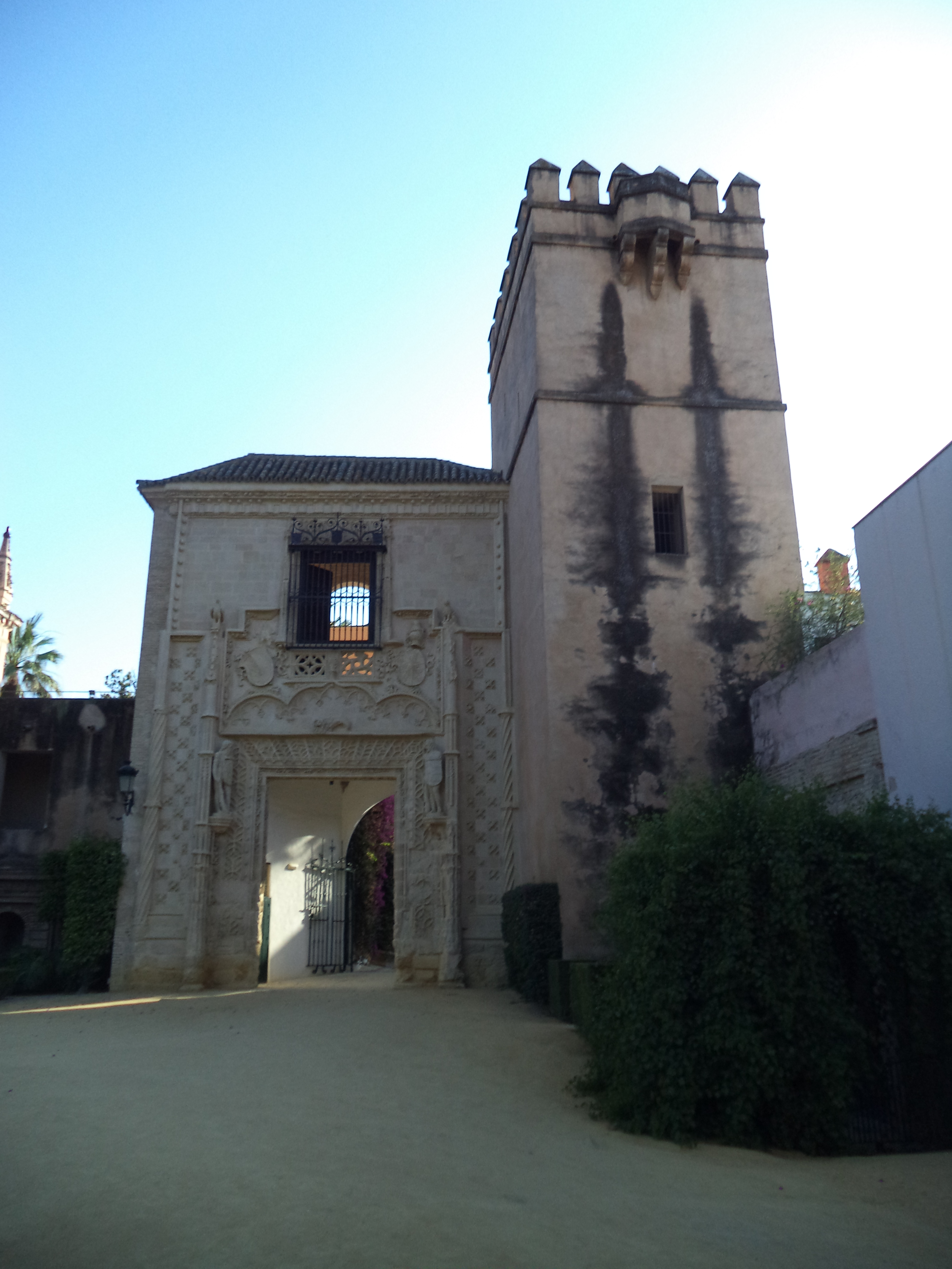 La Puerta del Palacio de los Duques de Arcos, también conocida como Puerta de Marchena, situada junto a un torreón en el Alcázar de Sevilla